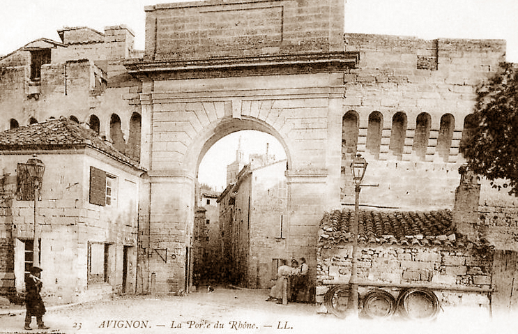 Photo de la Porte du Rhône fin XIXé s